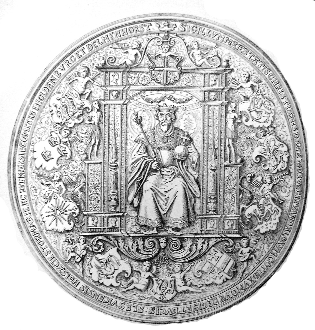 Christian 3. segl